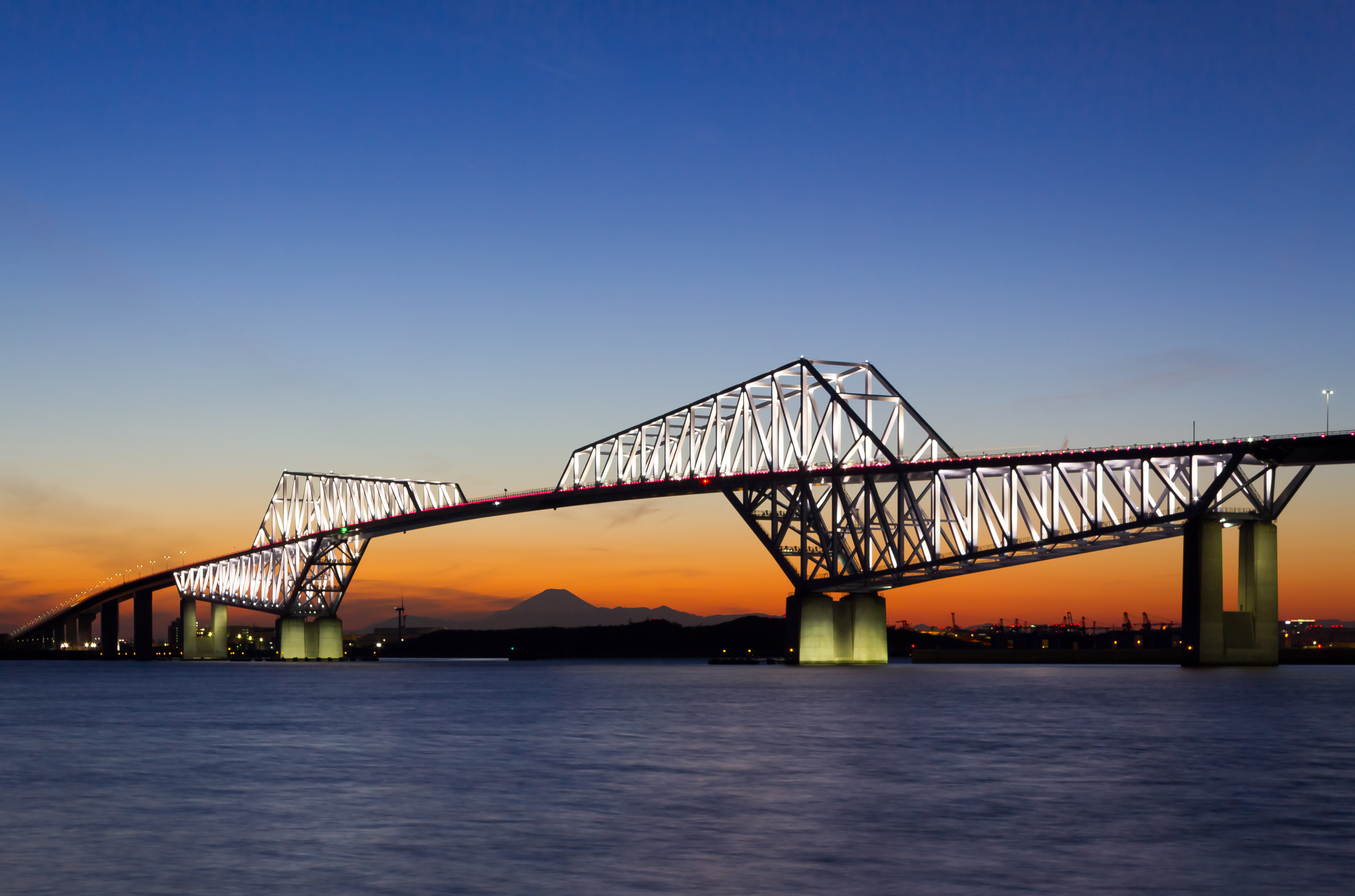 東京ゲートブリッジ